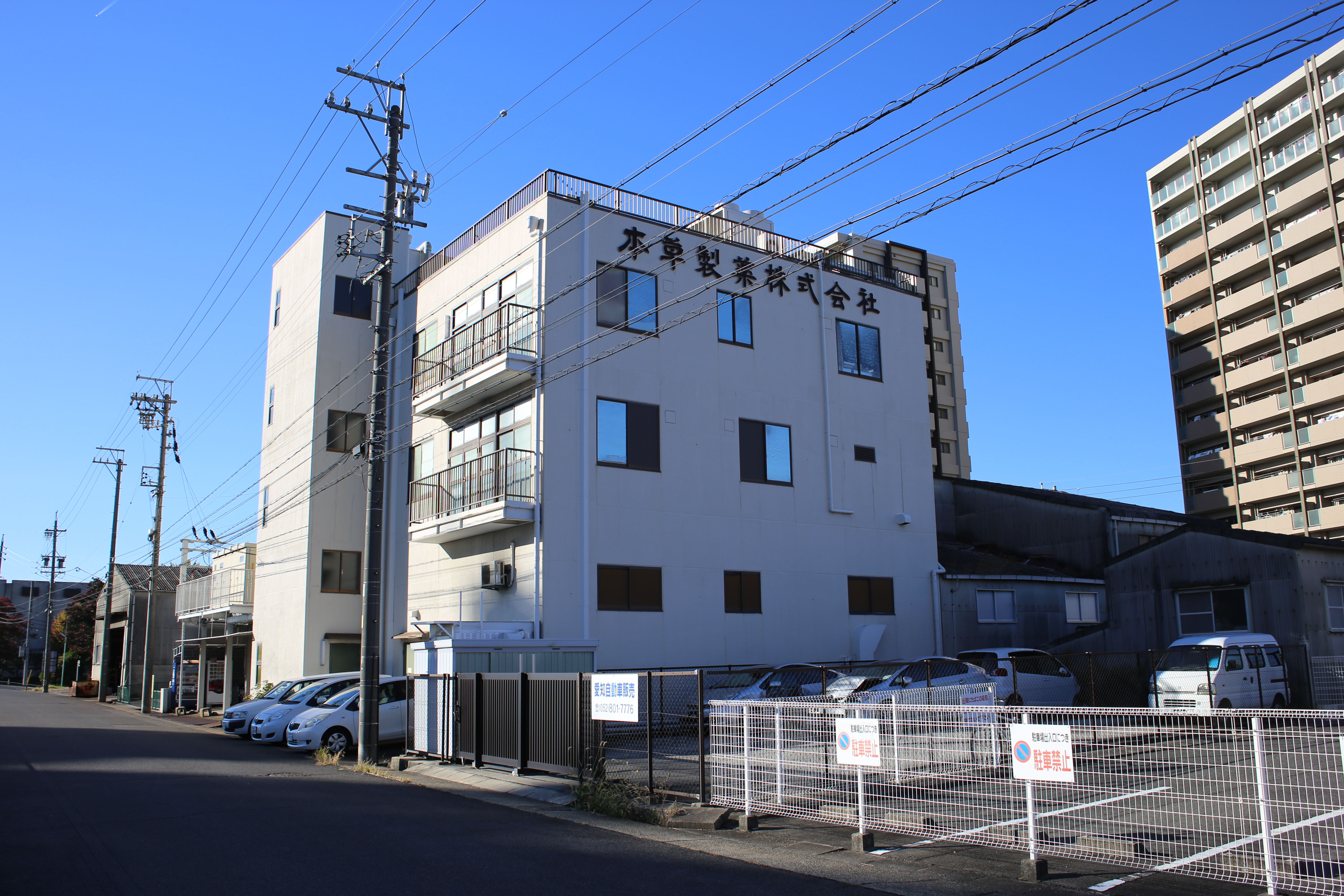 名古屋市天白区古川町の本草製薬本社を南側公道東側より撮影